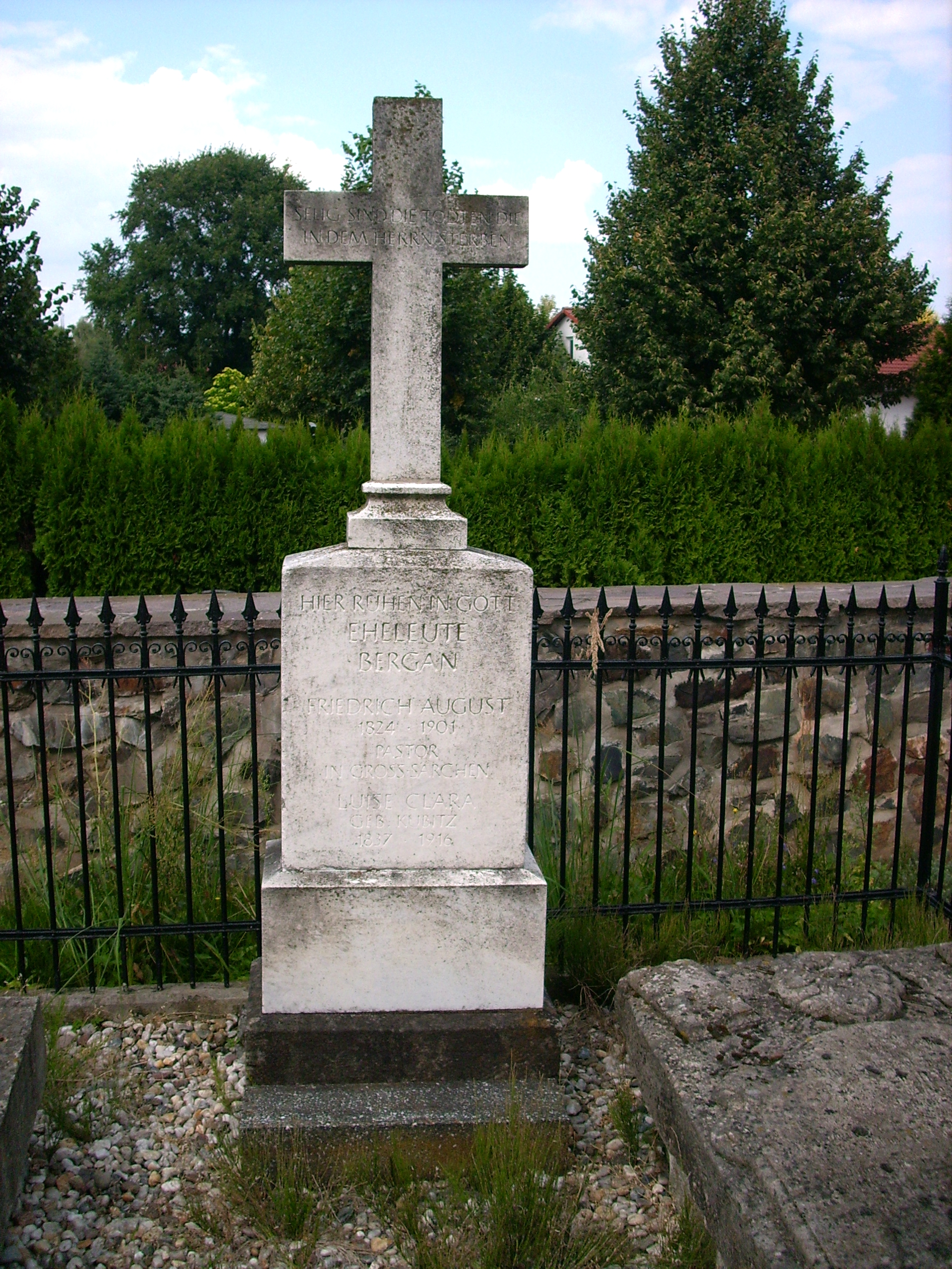 Grabstein auf dem Kirchfriedhof in Groß Särchen (Ortsteil von Lohsa) Hornjoserbsce: Narowny kamjeń fararja Bjedricha Awgusta Bergana (1824–1901) na kěrchowje we Wulkich Ždźarach (gmejna Łaz)